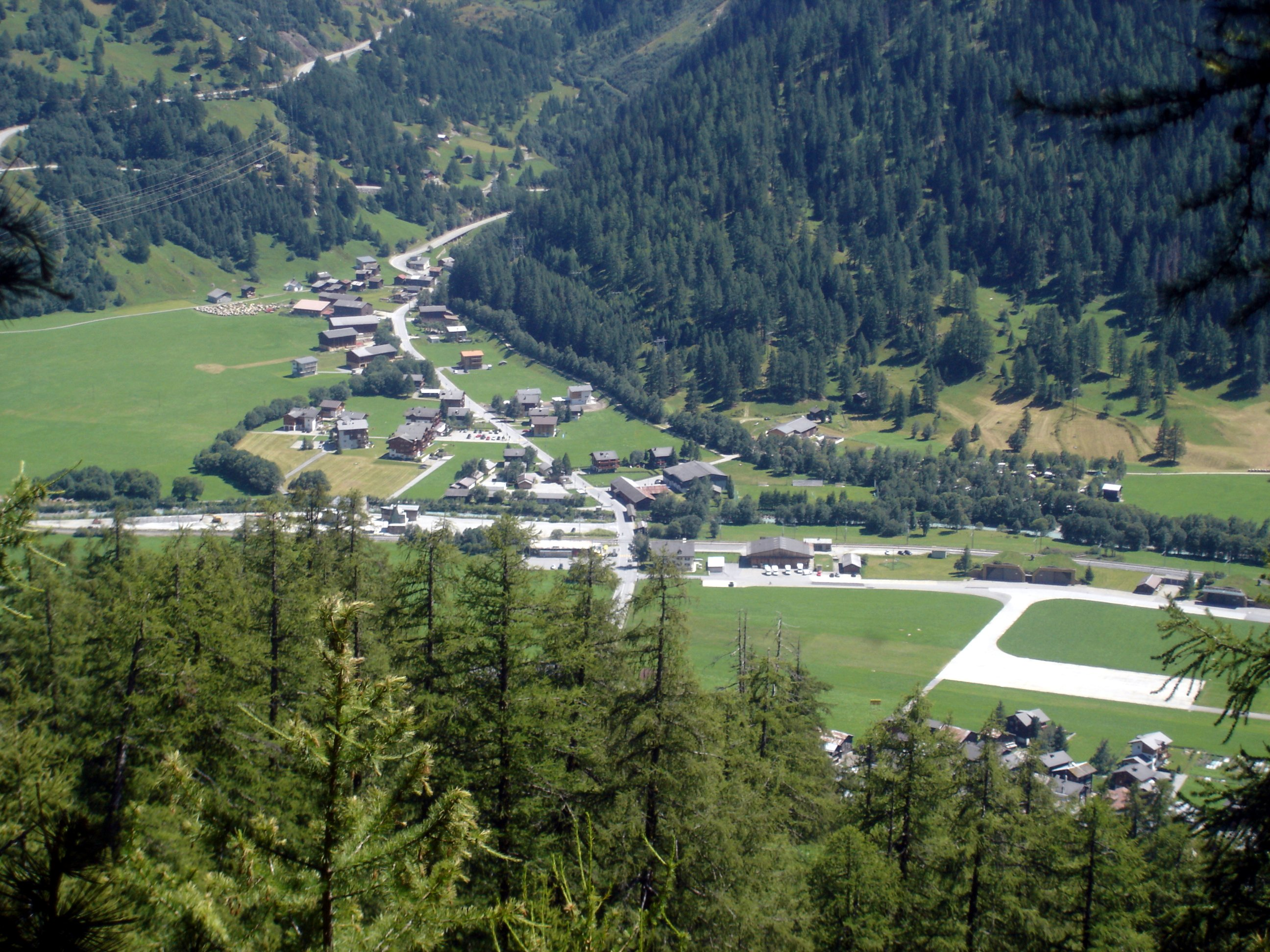 Ulrichen, Dorfteil "Im Loch", Beginn der Passstrasse zum Nufenenpass